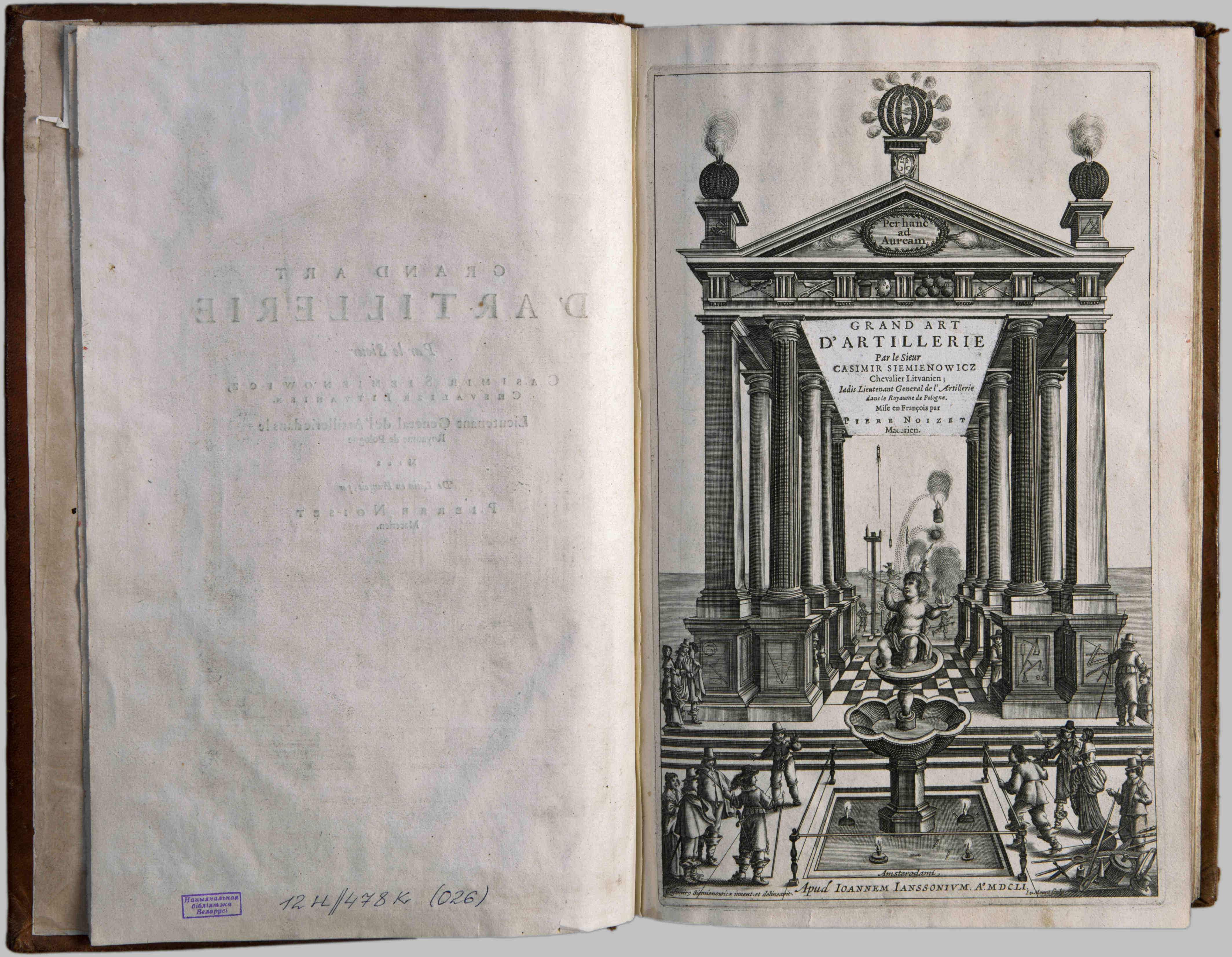 Мастацтва артылерыі, Семяновіч Казімір, 1651 г. Папера, друк. 22 аркушы з выявамі па малюнках К.Семяновіча, 32 см, Нацыянальная бібліятэка Беларусі